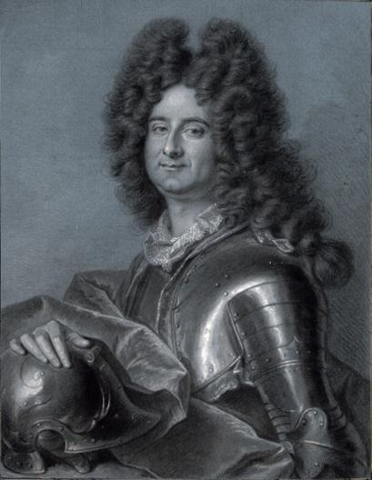 Portrait d'un militaire